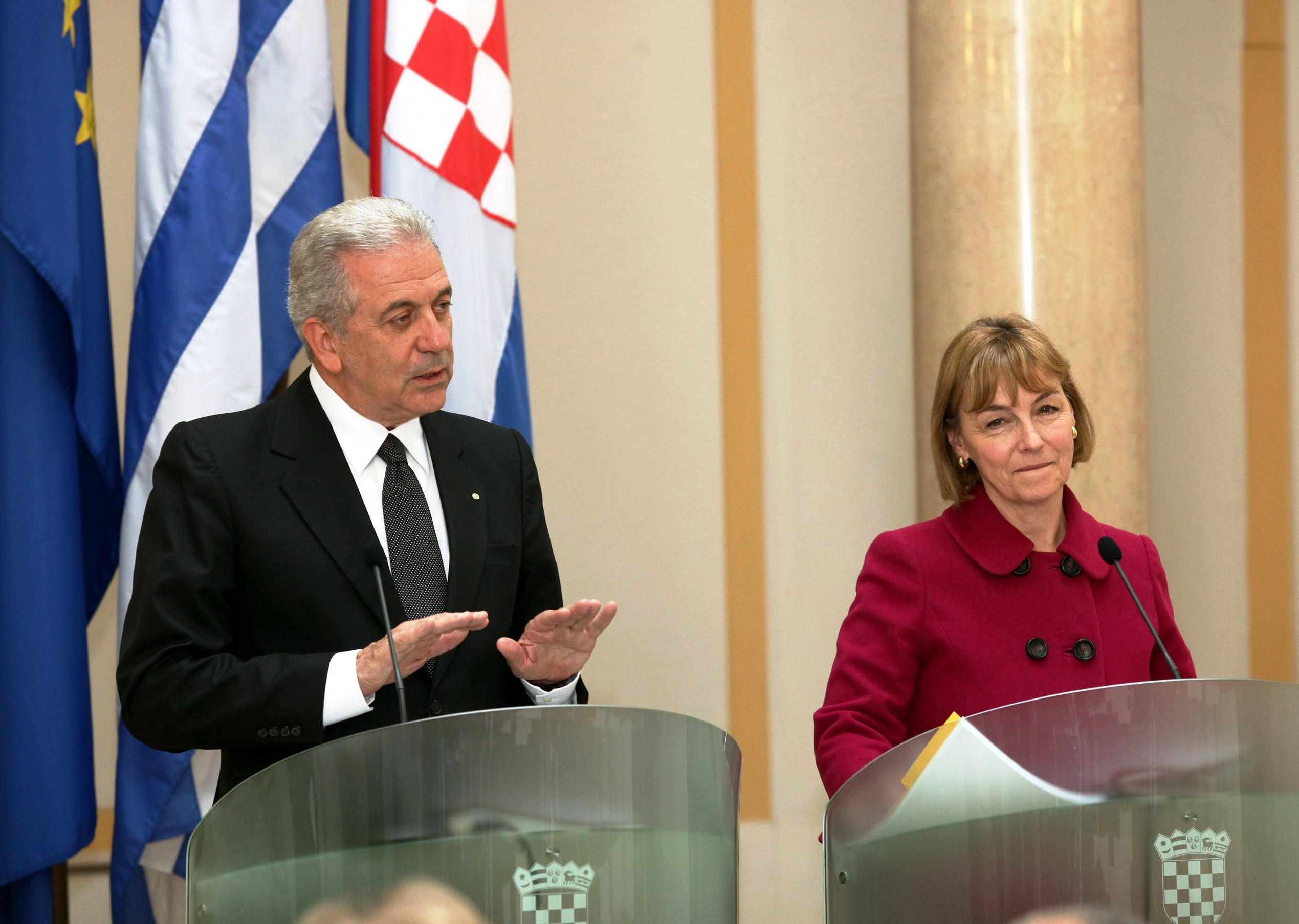 Ο Υπουργός Εξωτερικών Δημήτρης Αβραμόπουλος είχε διμερείς διαβουλεύσεις με την ομόλογό του Υπουργό Εξωτερικών της Κροατίας κα Vesna Pusić (05.04.2013).